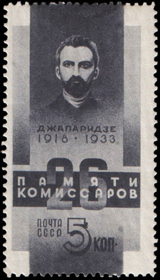 25-летие со дня гибели 26 бакинских комиссаров: П. А. Джапаридзе (Алеша, 1880-1918). Почтовая марка СССР 1933г.